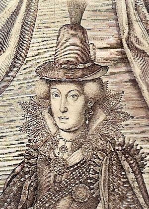 Magdalene von Brandenburg (1582-1616), Landgräfin von Hessen-Darmstadt